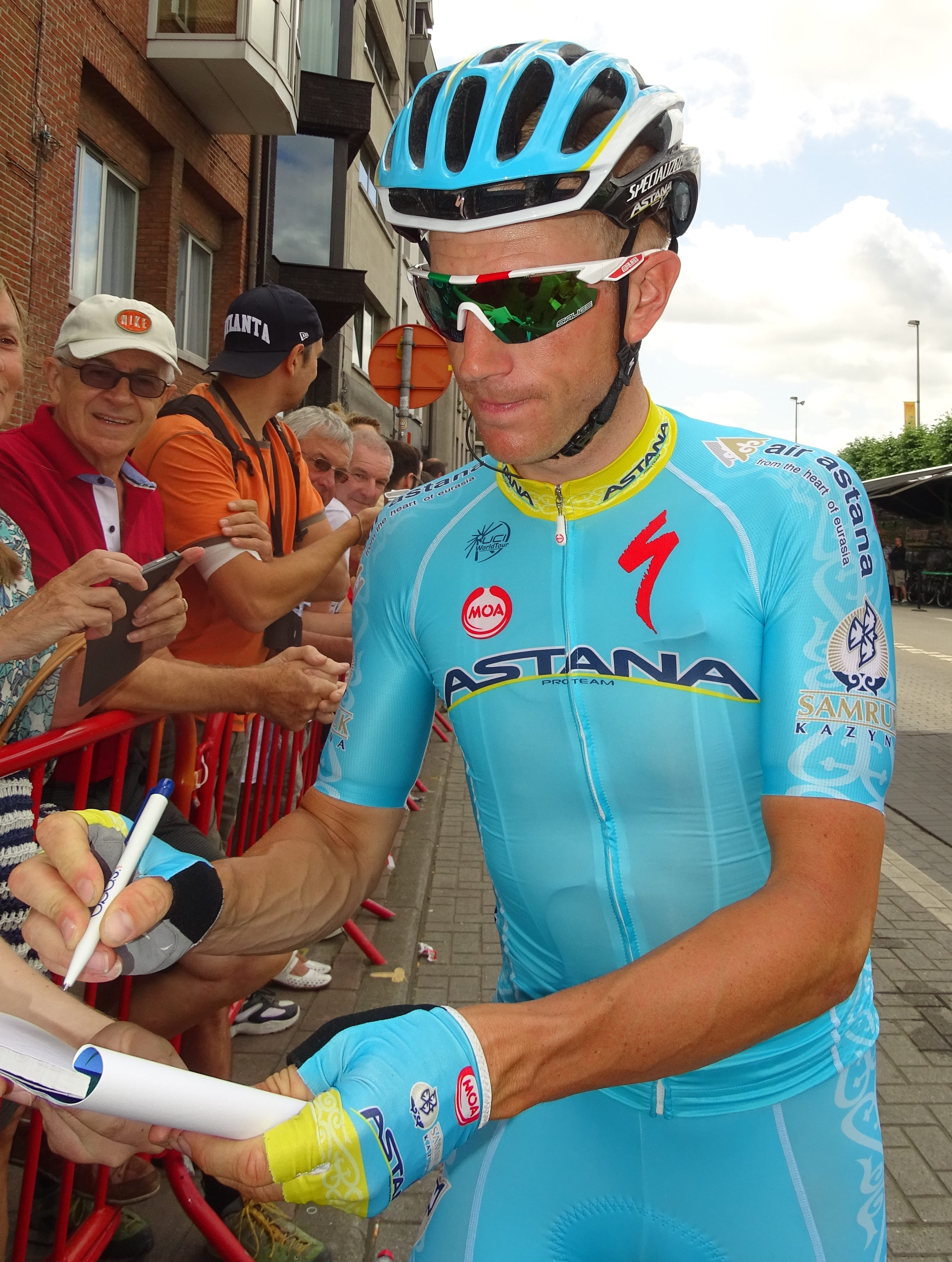 Reportage réalisé le lundi 6 juillet à l'occasion du départ de la troisième étape du Tour de France 2015 à Anvers, Belgique.